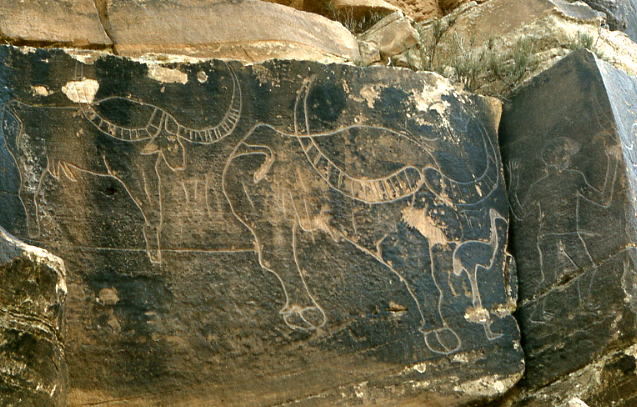 Gravures préhistoriques de la région d'El Bayadh, Algérie